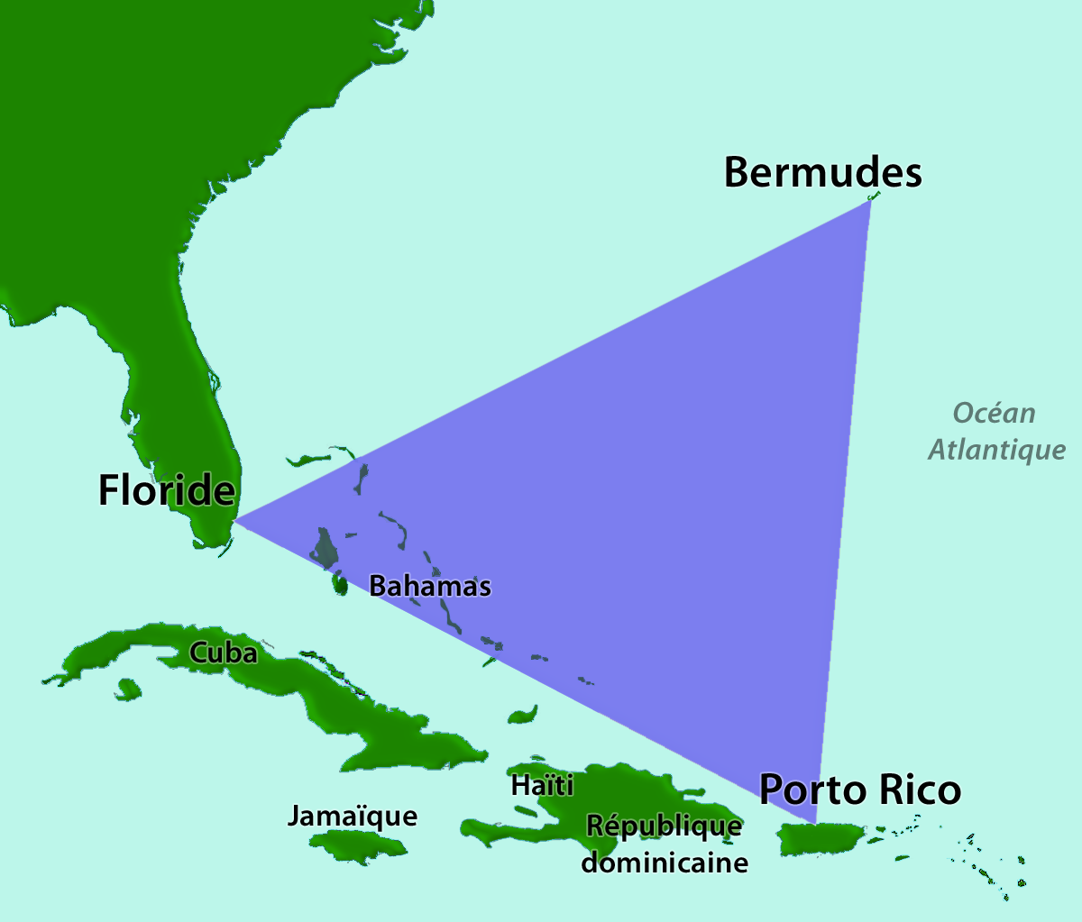 Localisation du triangle des Bermudes